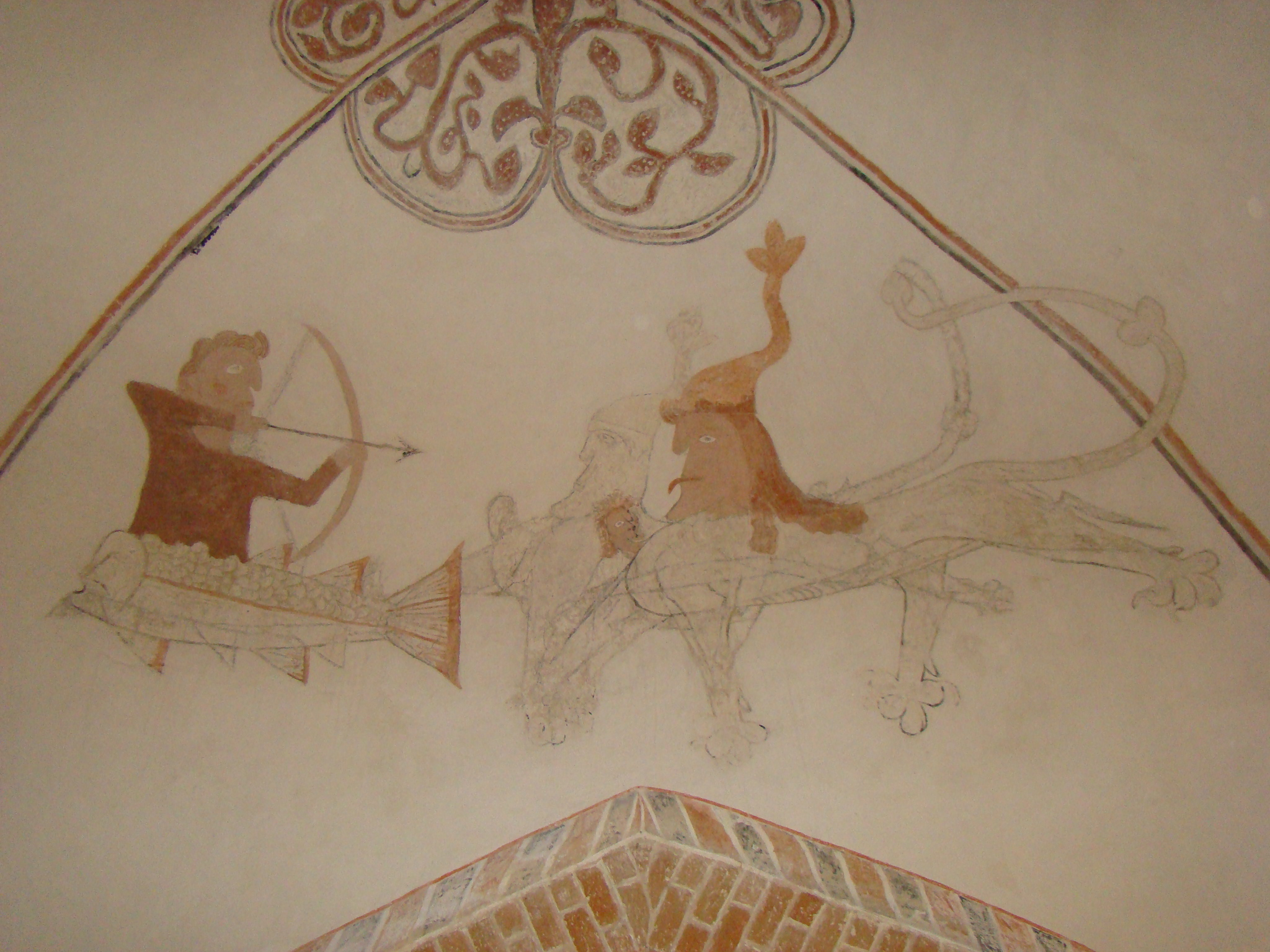 Fresken in der Kirche von Groß Gievitz. Foto: Peter Schmelzle 2011